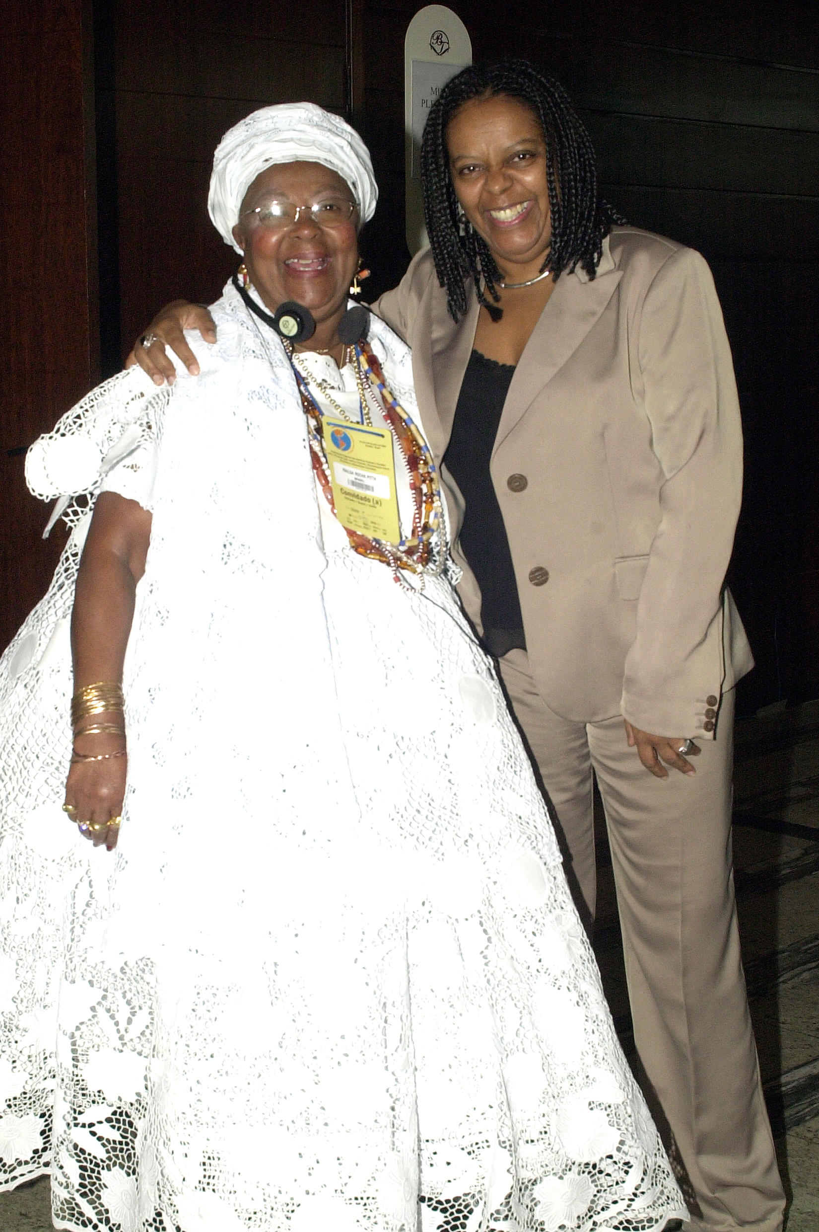 Brasília - Ministra Matilde Ribeiro, da Secretaria Especial para Políticas de Promoção da Igualdade , com a Baiana Mãe de Santo Raida, na Conferência Regional das Americas.